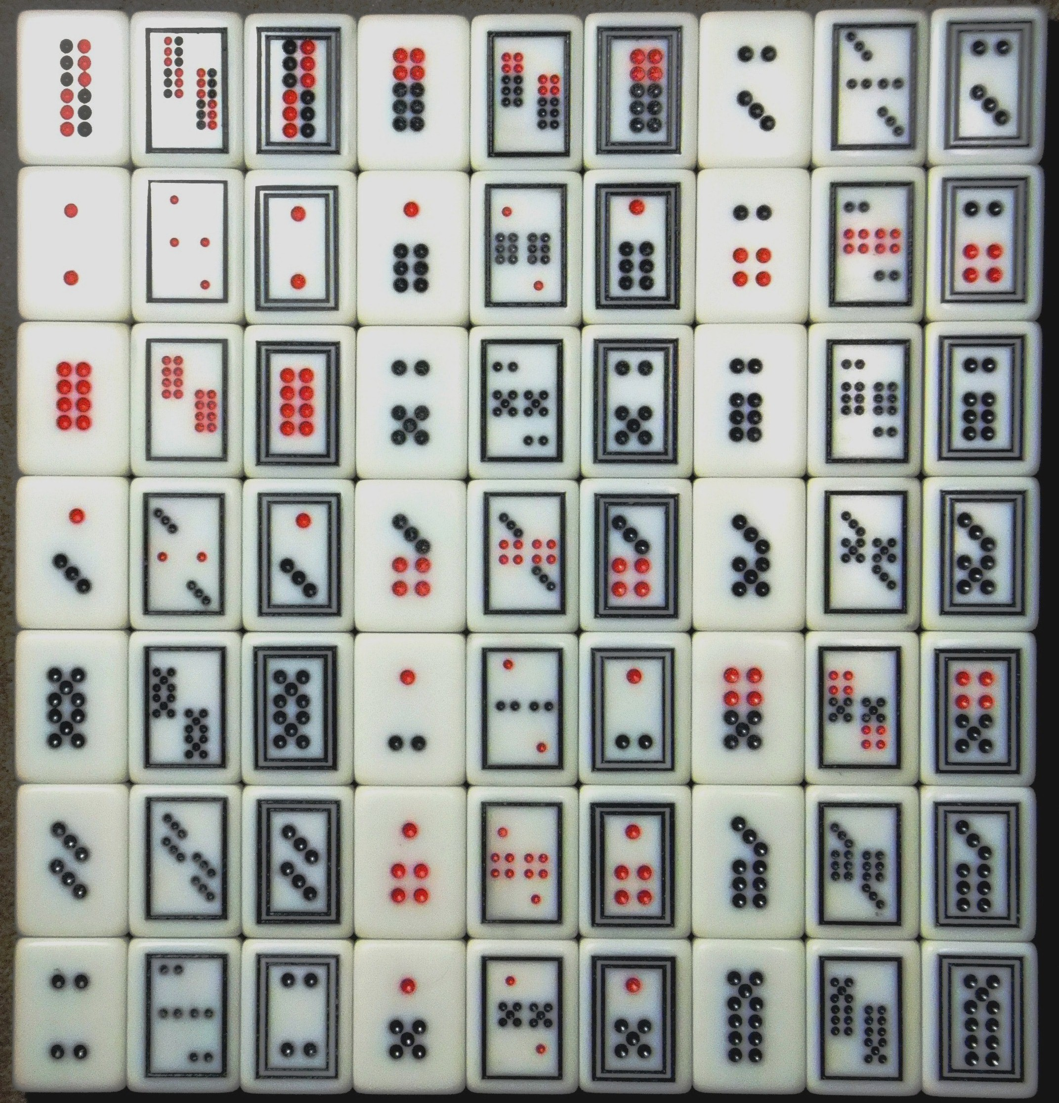 中文（台灣）: 挖花牌牌具